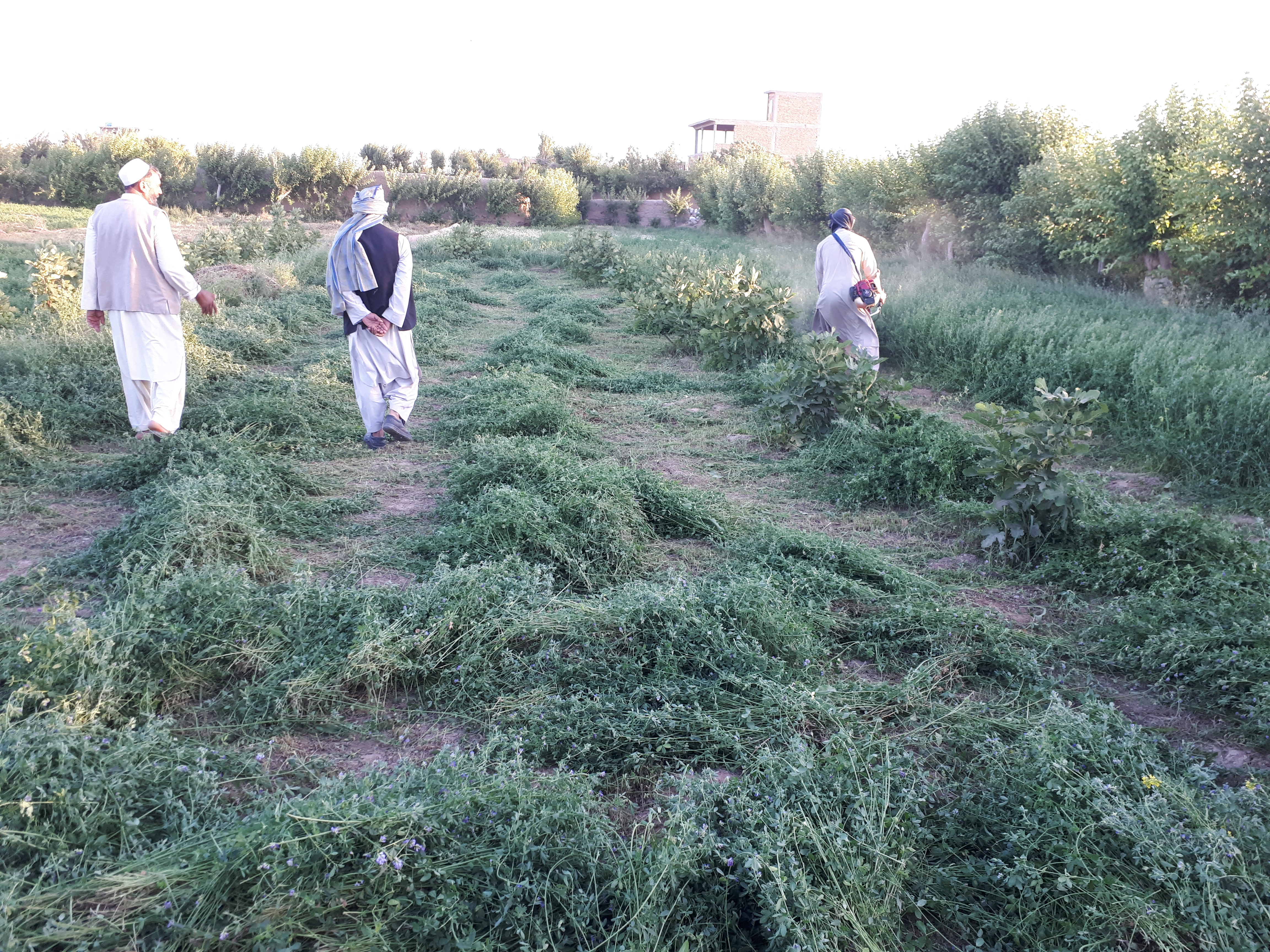 یک باغ و زمین زراعتی در ولسوالی زنده جان هرات